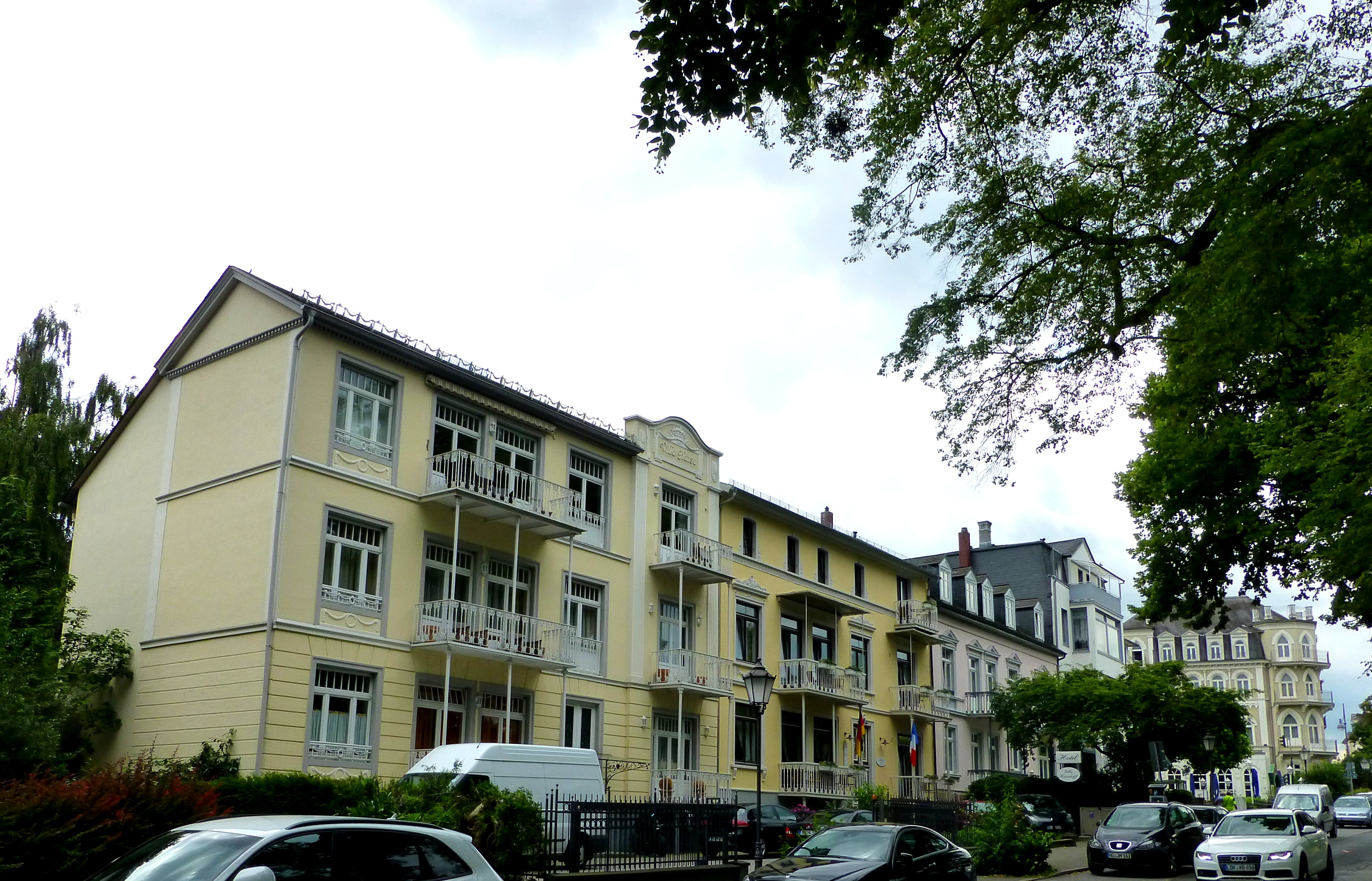 Bad Homburg – Villa Hansa – hier wurde die am 20. Juni 1948 in Kraft getretene Währungsreform vorbereitet